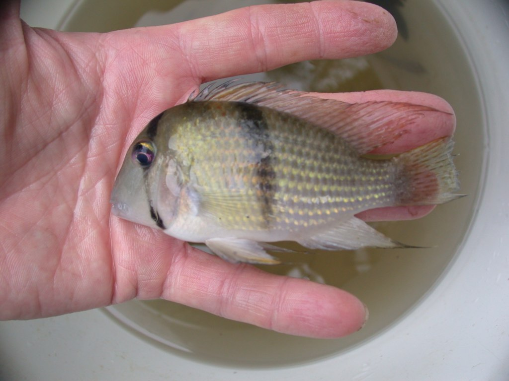 DSCN6264_1